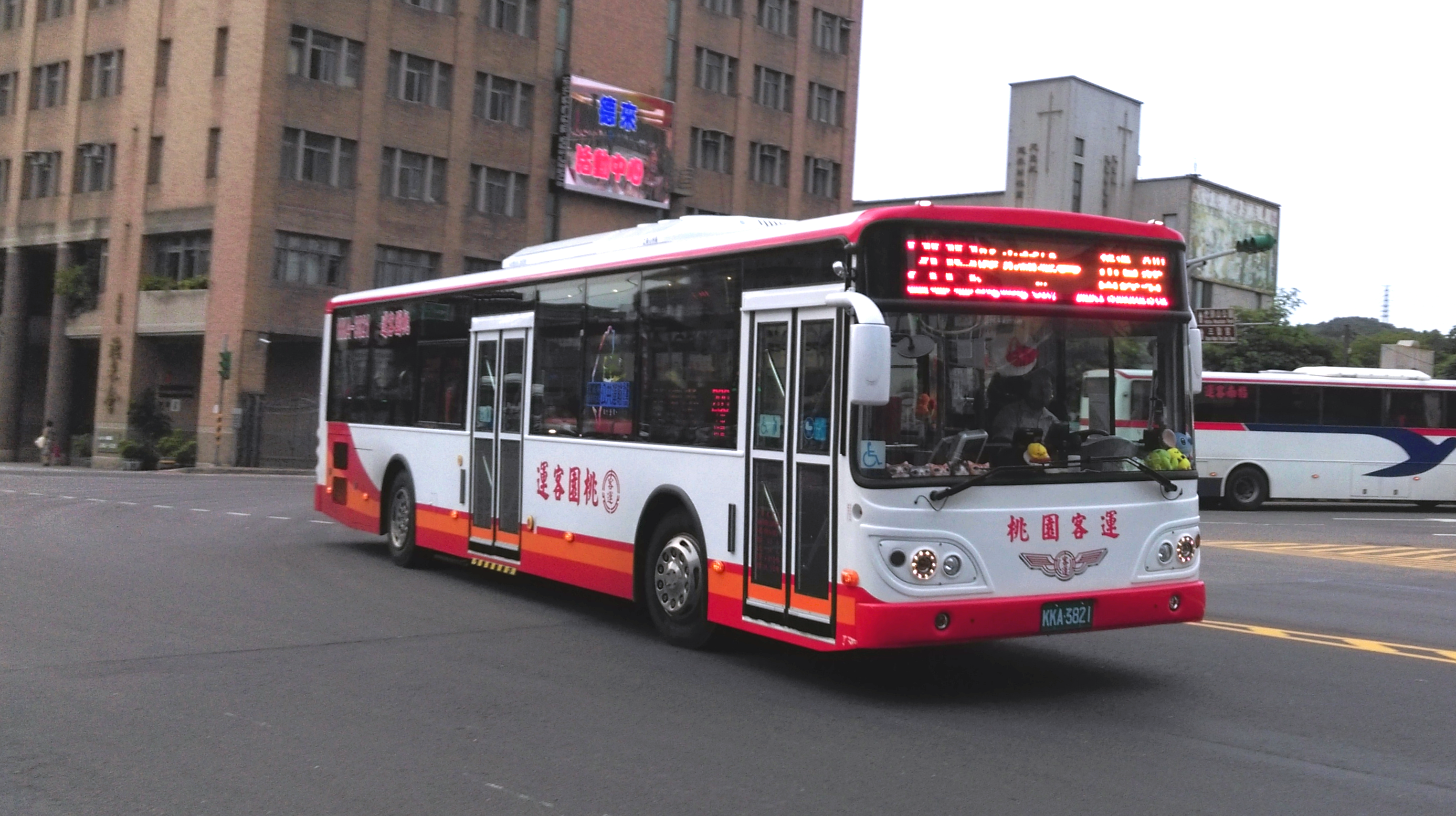 2018 Master MB120NS KKA-3821